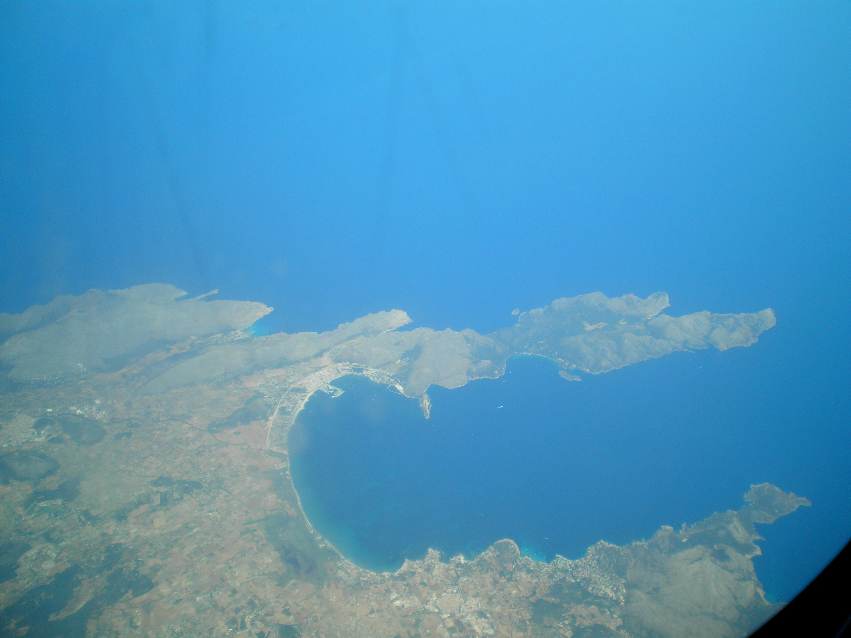 El Cabo de Formentor desde un avión. Formentor Cape from a plane.